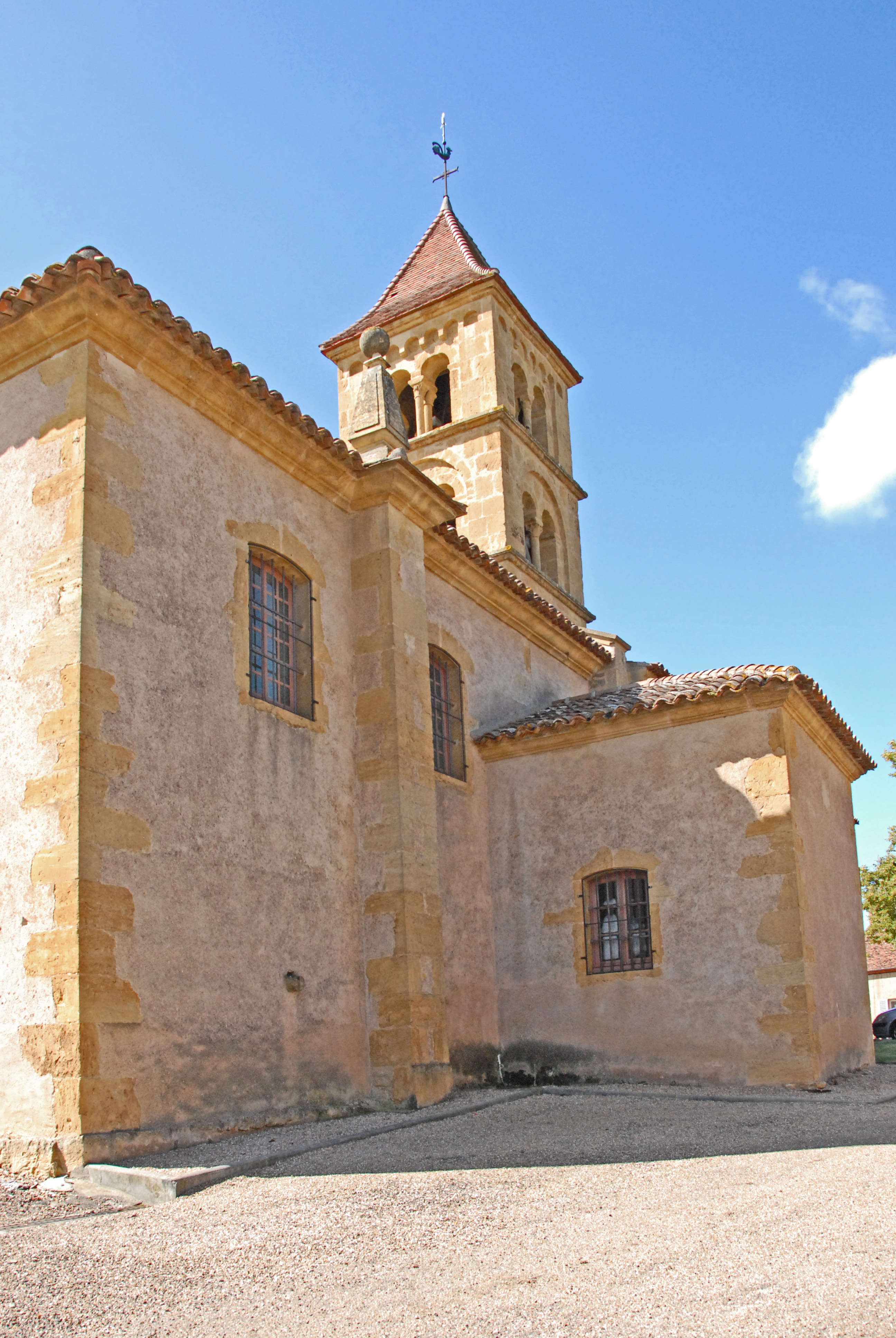 Sts-Pierre-et-Paul de Montceaux-l'Étoile, Grabkapelle, Sakristei von NO